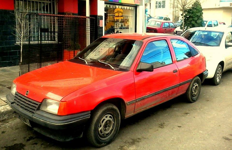 Un kadett 96